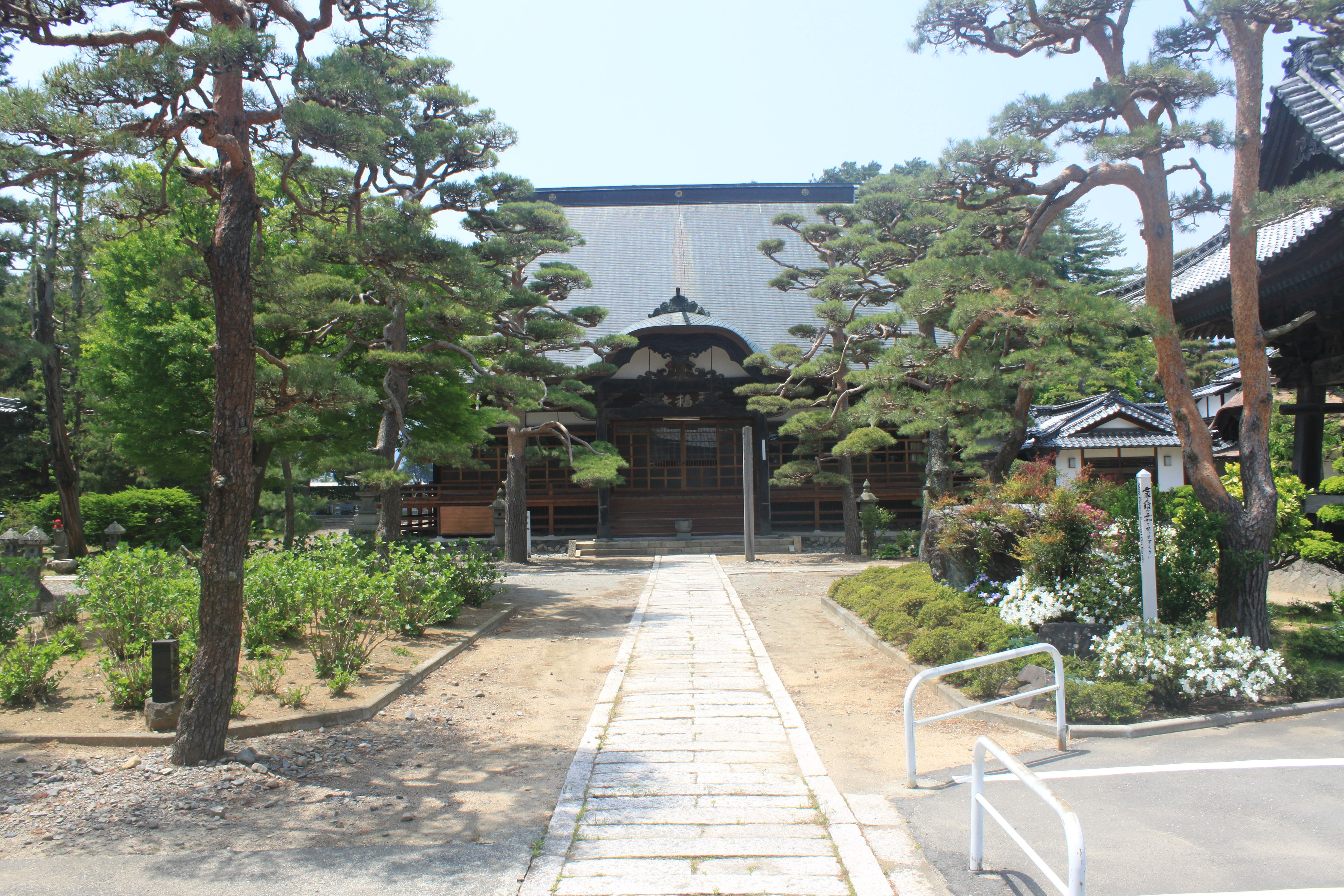 専稱寺